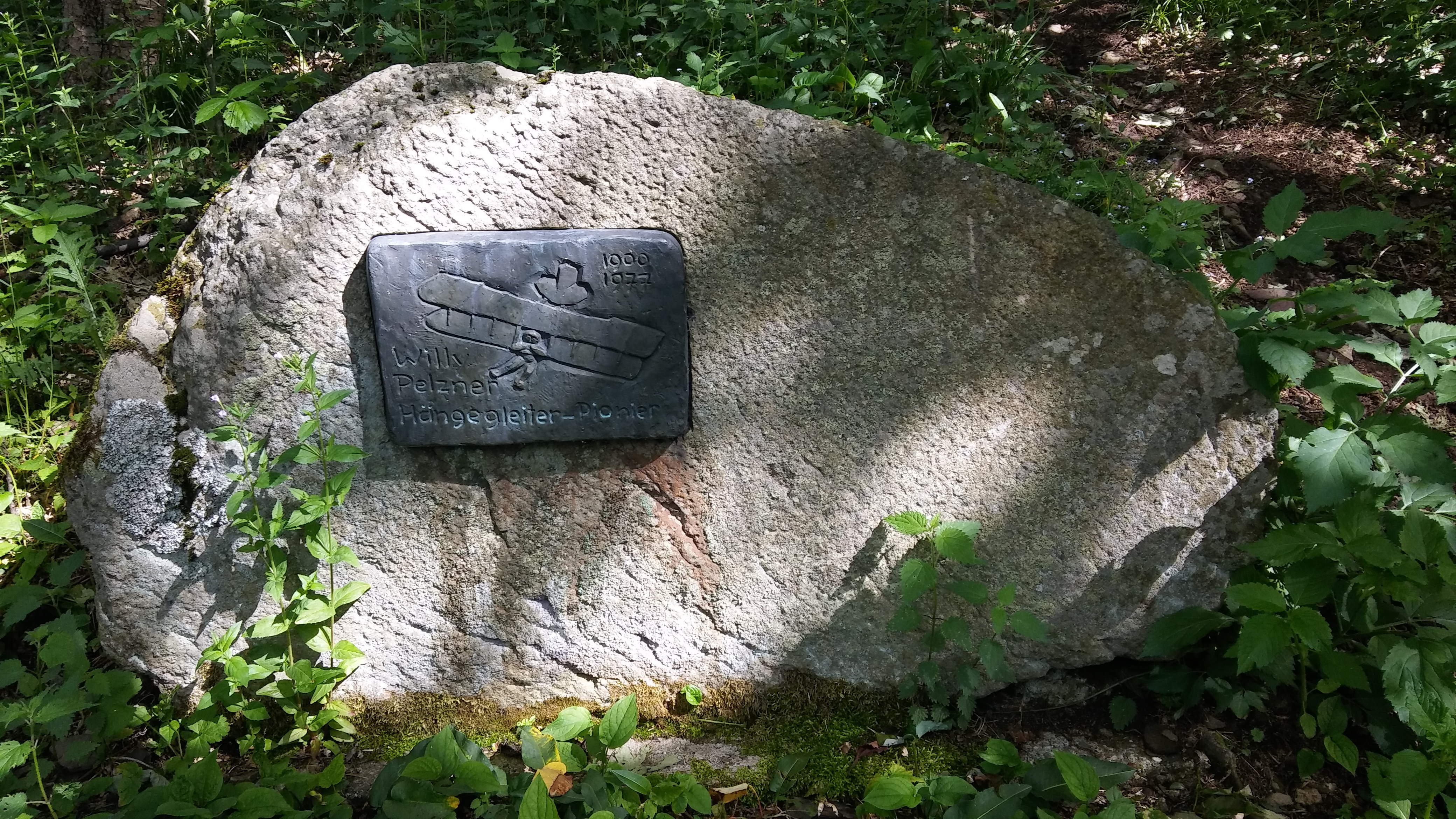 Gedenkstein Willy Pelzner (Hängegleitpionier) 1900 -1977